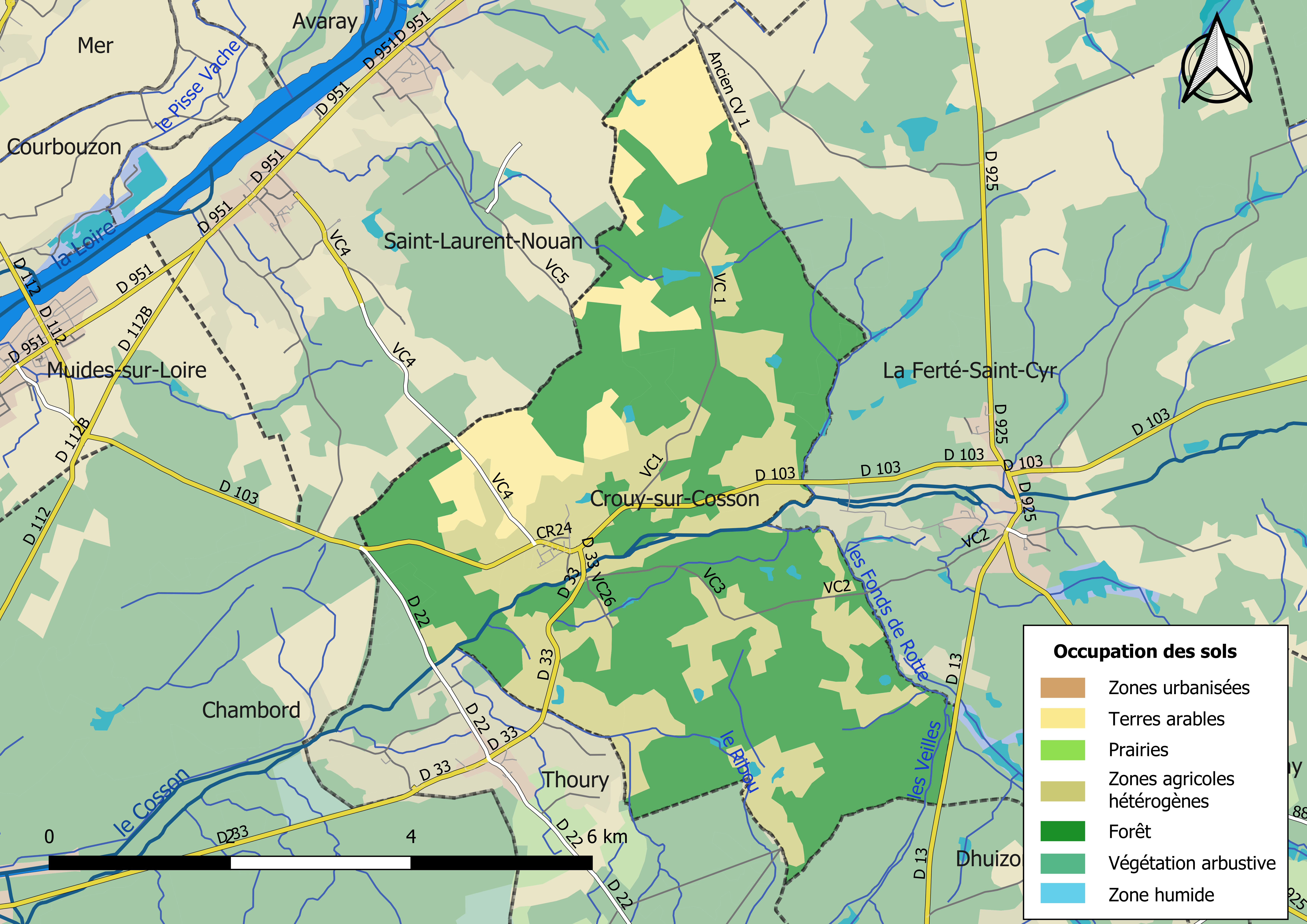 Carte des infrastructures et de l’occupation des sols en 2018 de la commune de Crouy-sur-Cosson (France).